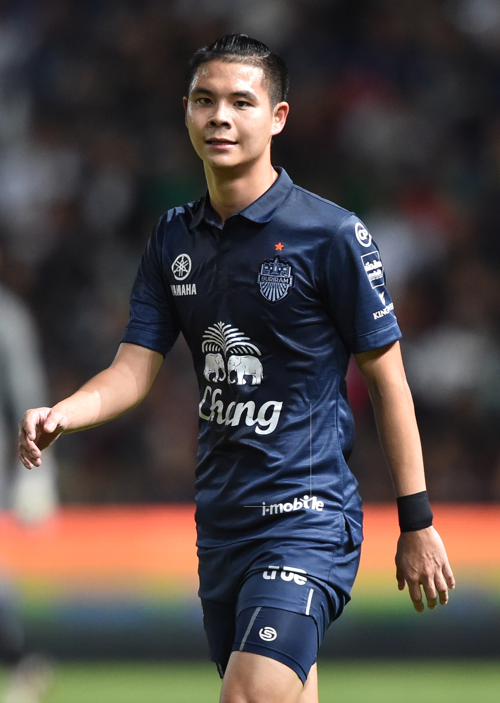 Ton Narubadin 13